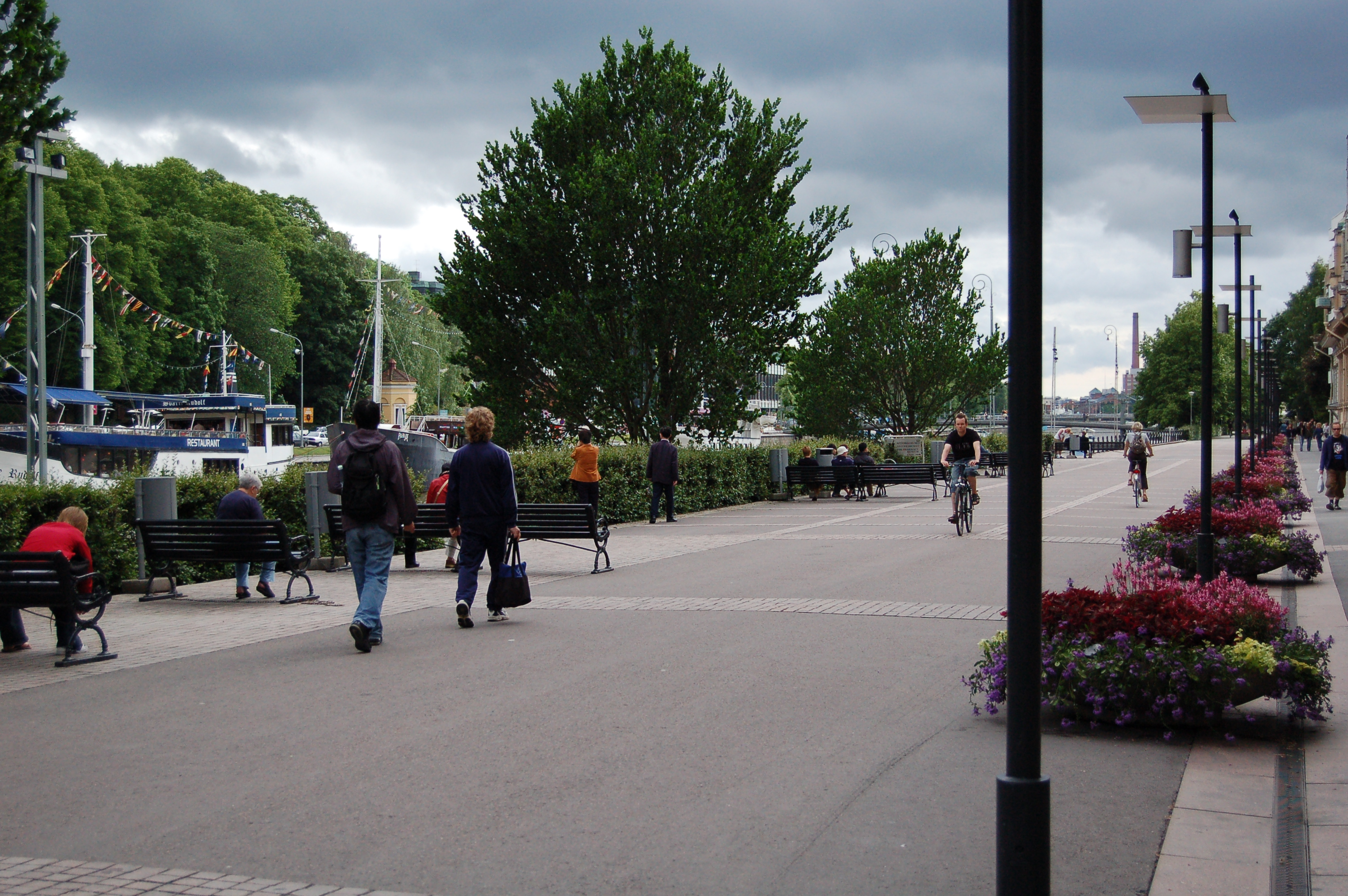 Läntinen Rantakatu, Aurasillasta alajuoksulle.